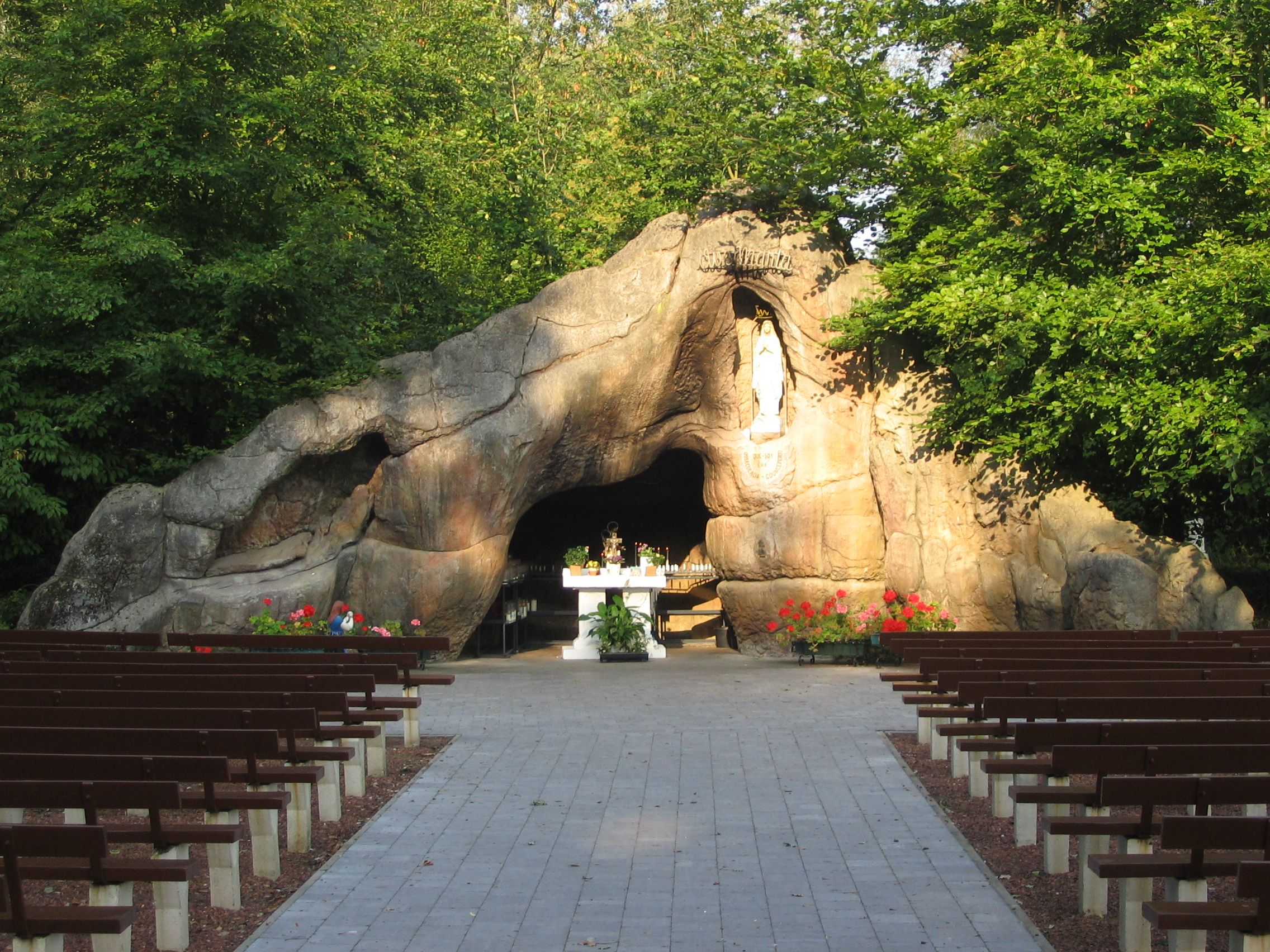 Lourdesgrot te Humbeek - eigen foto - september 2006